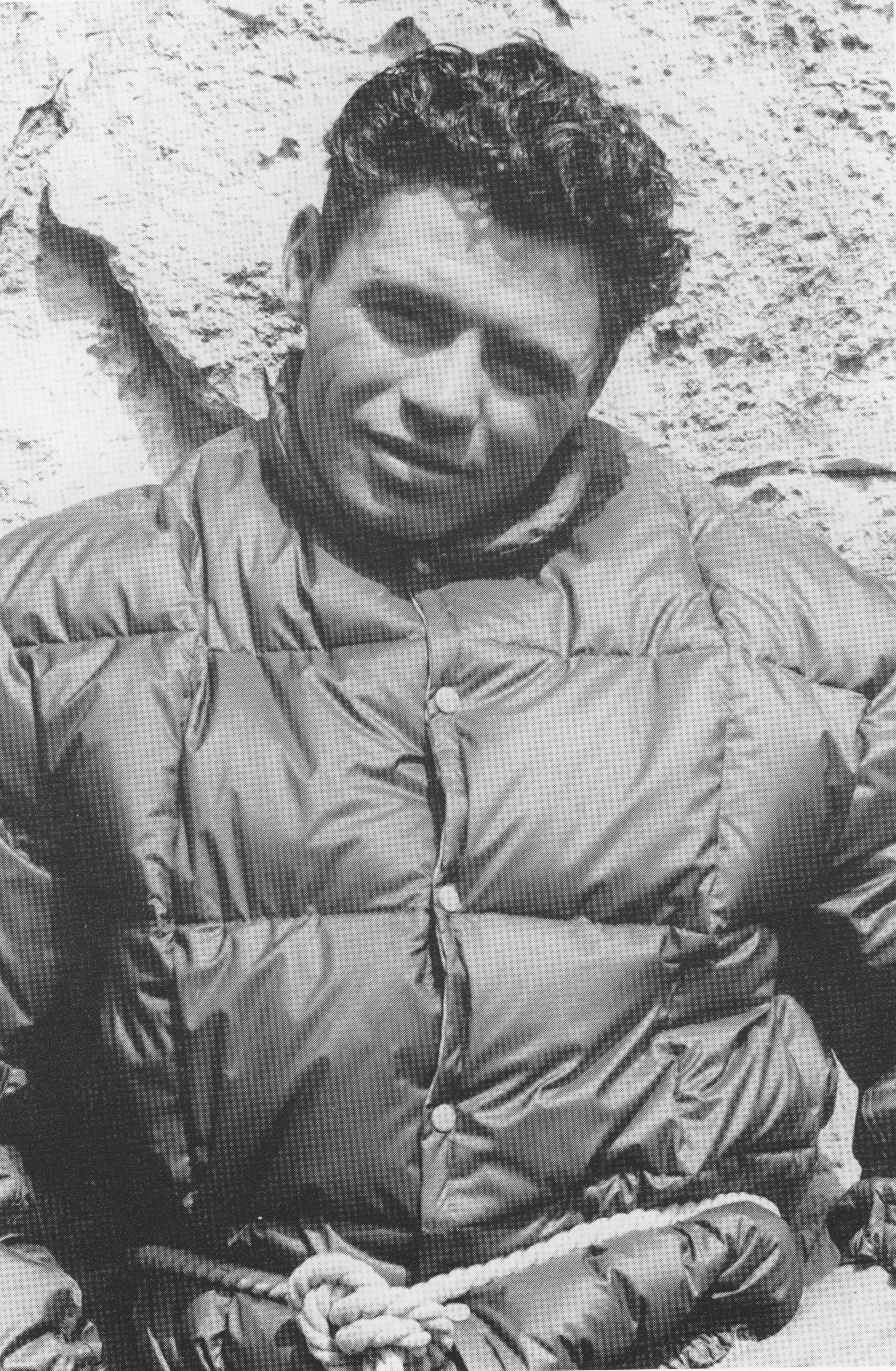 Andrea Oggioni al Nibbio (Lario, Lombardia)